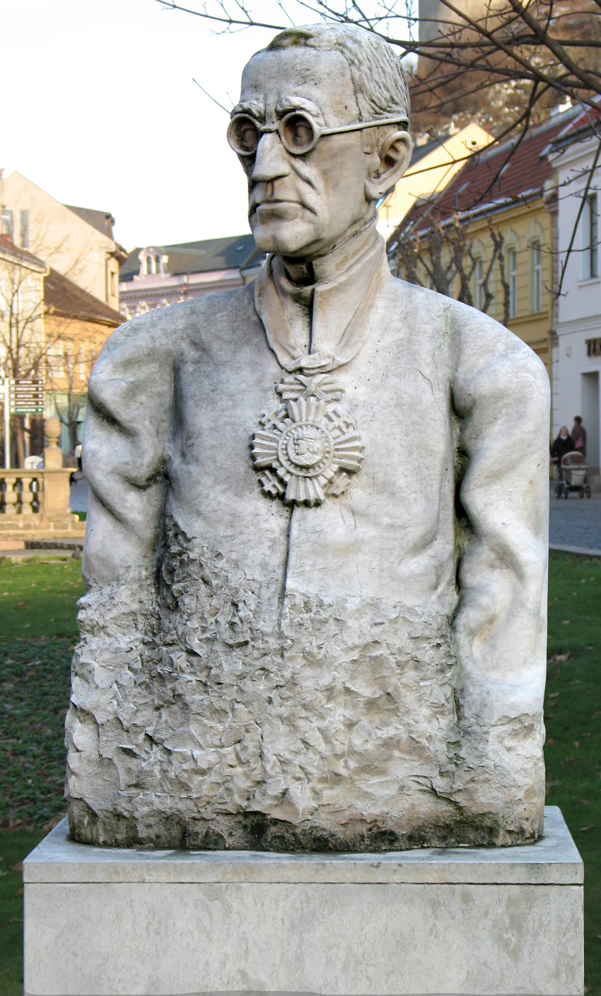 Jozef Bránecký